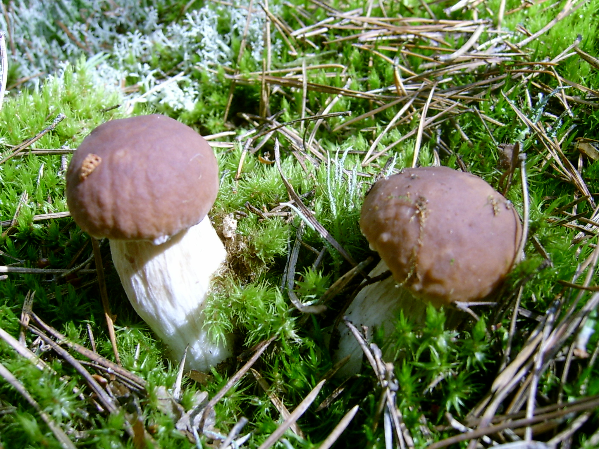 Puszcza Notecka na terenie gminy Santok, powiat gorzowski, woj. lubuskie, Poland